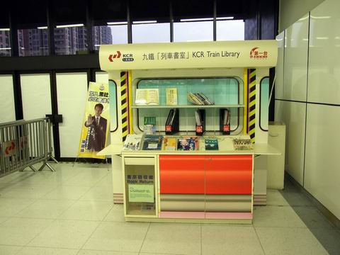 沙田站列車書室